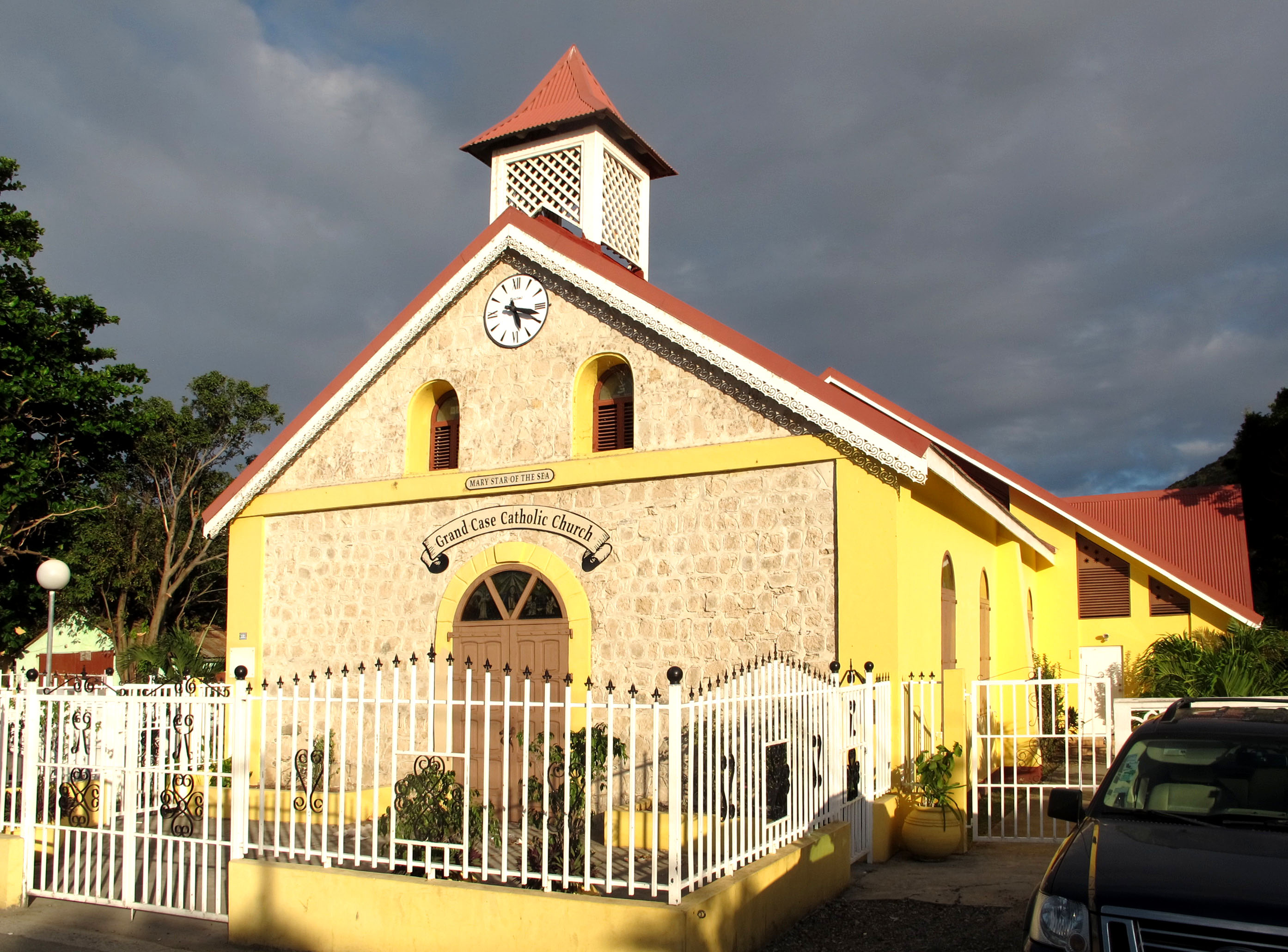 Église catholique de Grand-Case, île St-Martin, Antilles, France